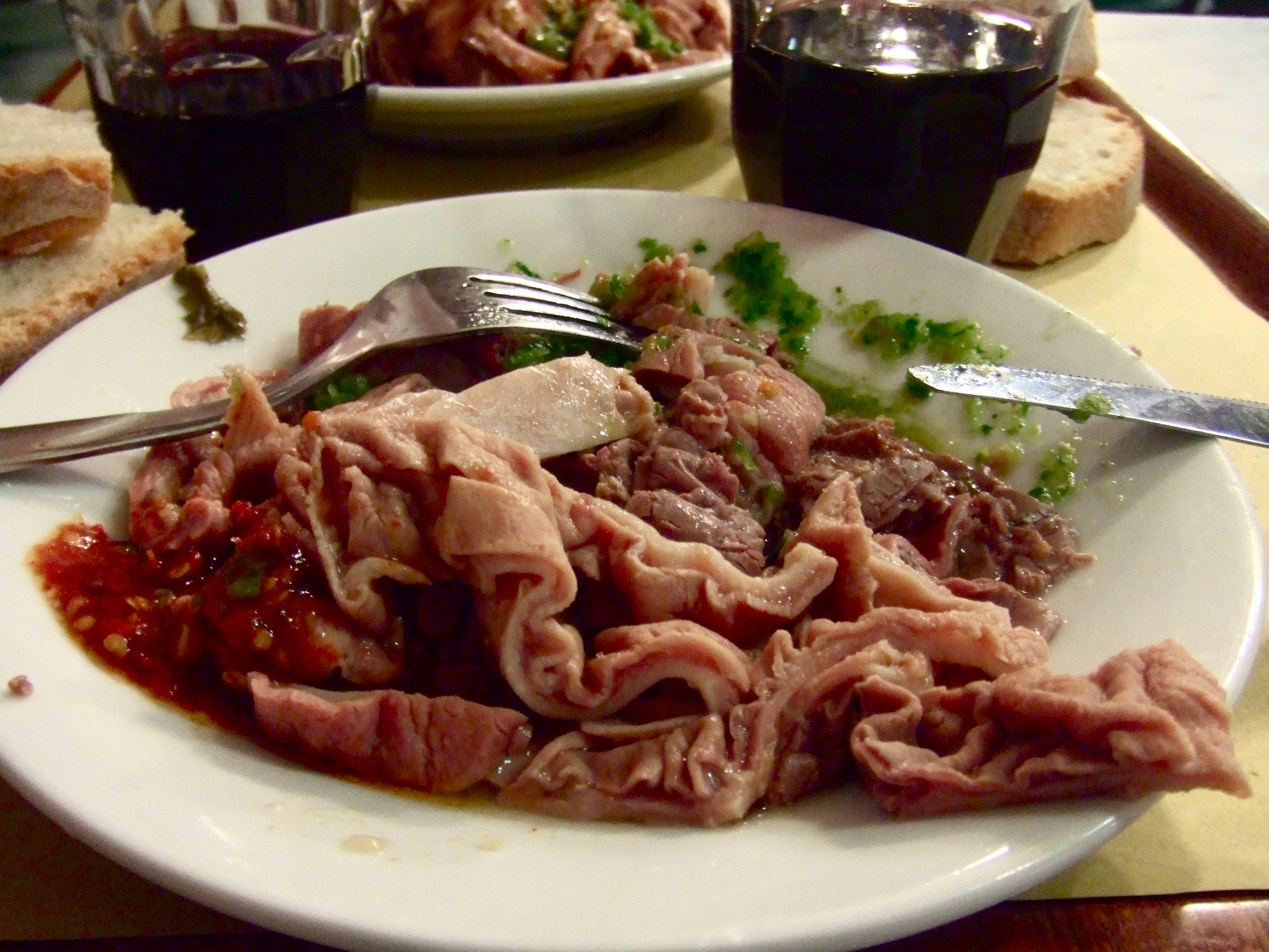 Plat de lampredotto florentin servi de deux sauces (rouge et verte)